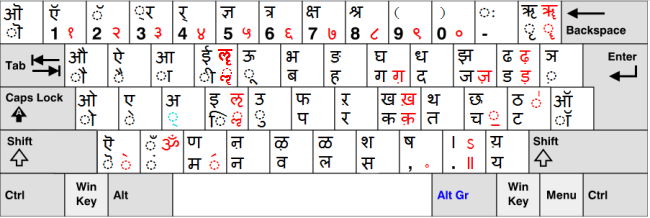 Windowsの「デバナガリ - INSCRIPT」キーボード